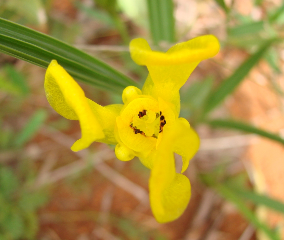 Cipura xanthomelas subsp. xanthomelas (Cipura flava) - IRIDACEAE Parque Olhos D' Agua - Brasília - Distrito Federal - Brasil.